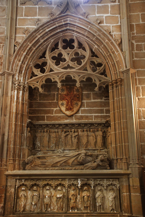 oteiza